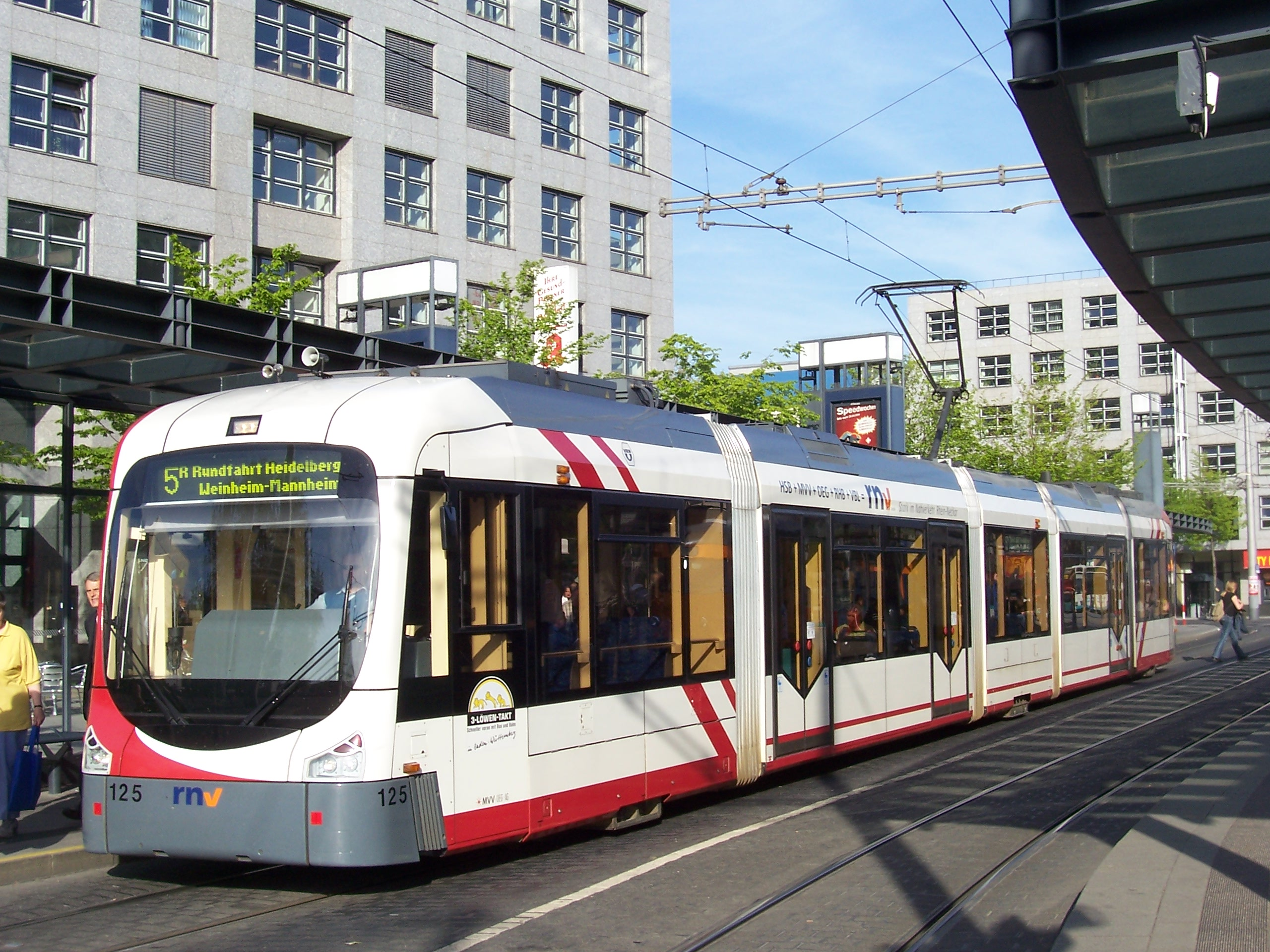 Rhein-Neckar Variobahn Nummer 125 der OEG am Mannheimer Hauptbahnhof.